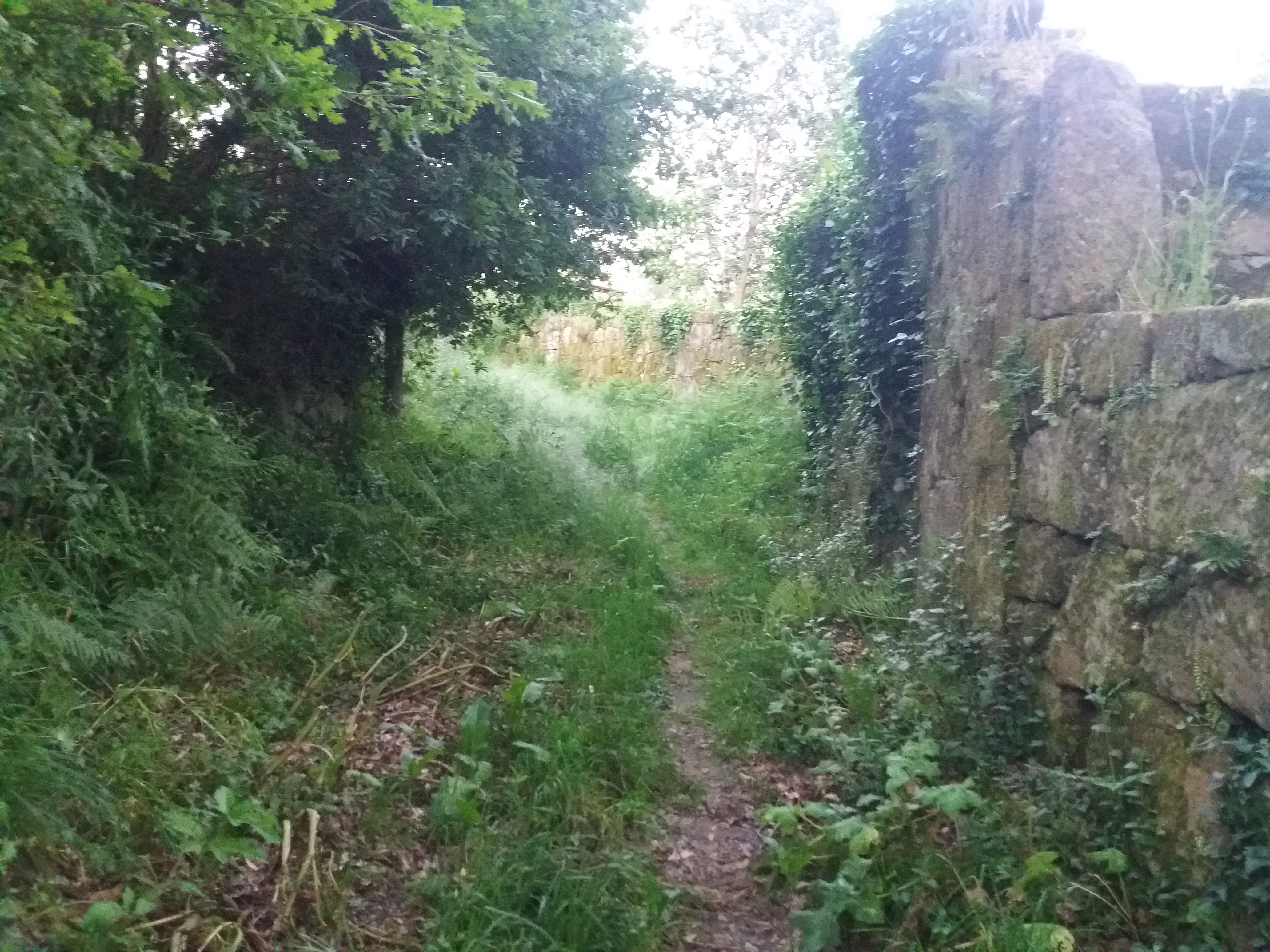 O Camiño de Fontán entre a pousa e o pazo do mesmo nome.